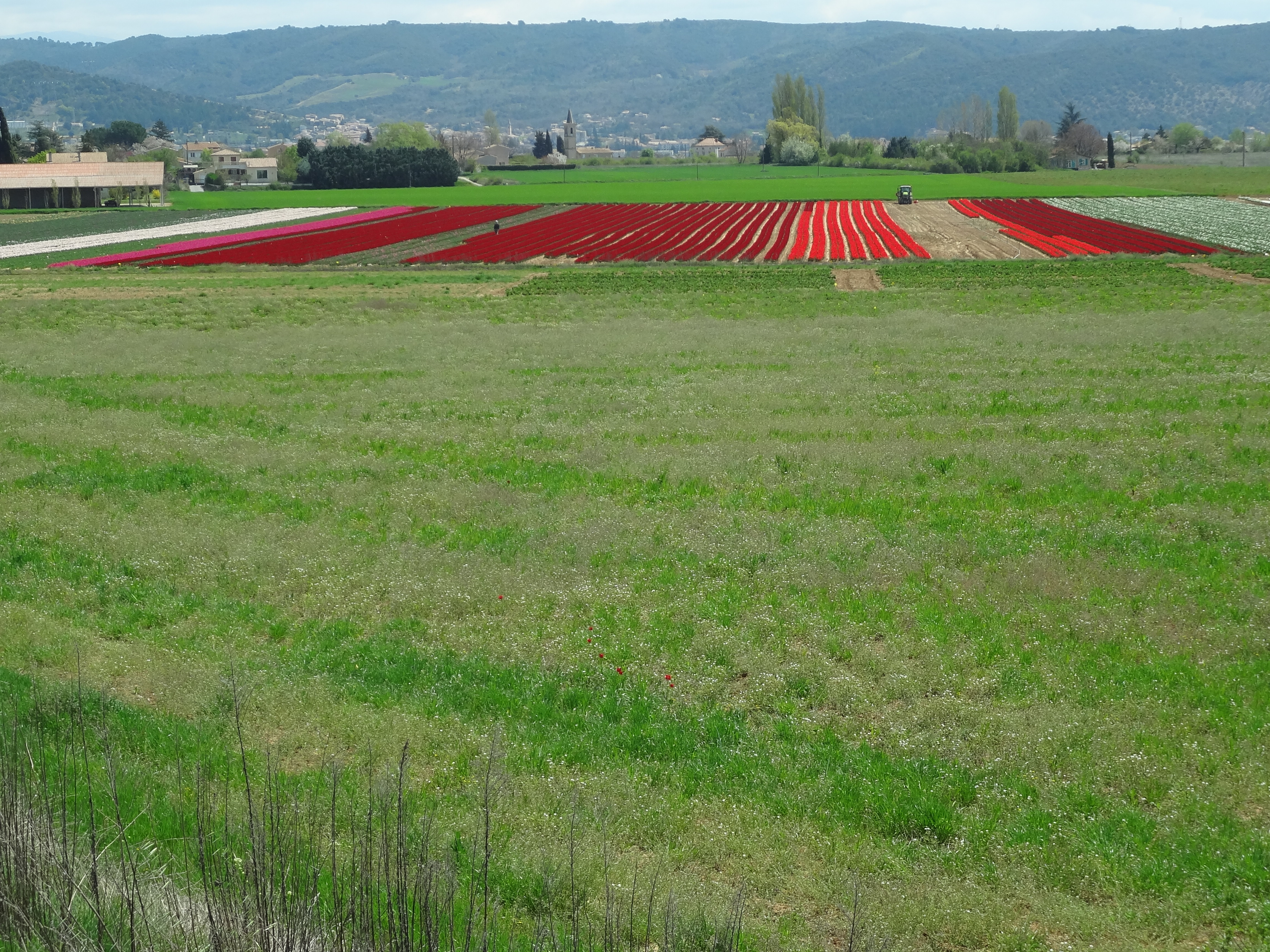 Horticulture à La Brillanne